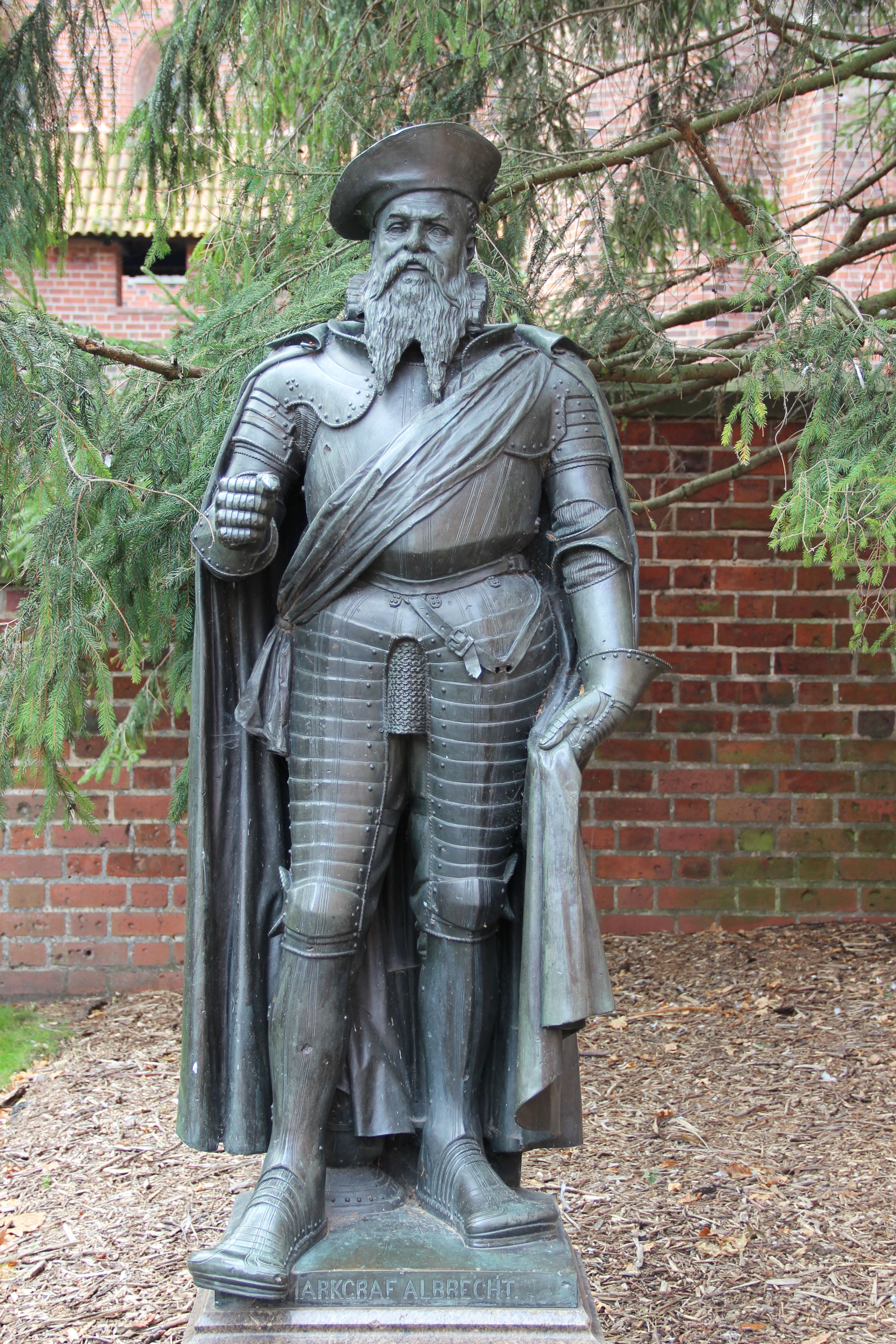 Albrecht von Preußen, letzter Hochmeister des Deutschen Ordens in Preußen und erster Herzog in Preußen - Denkmal auf der Marienburg in Malbork